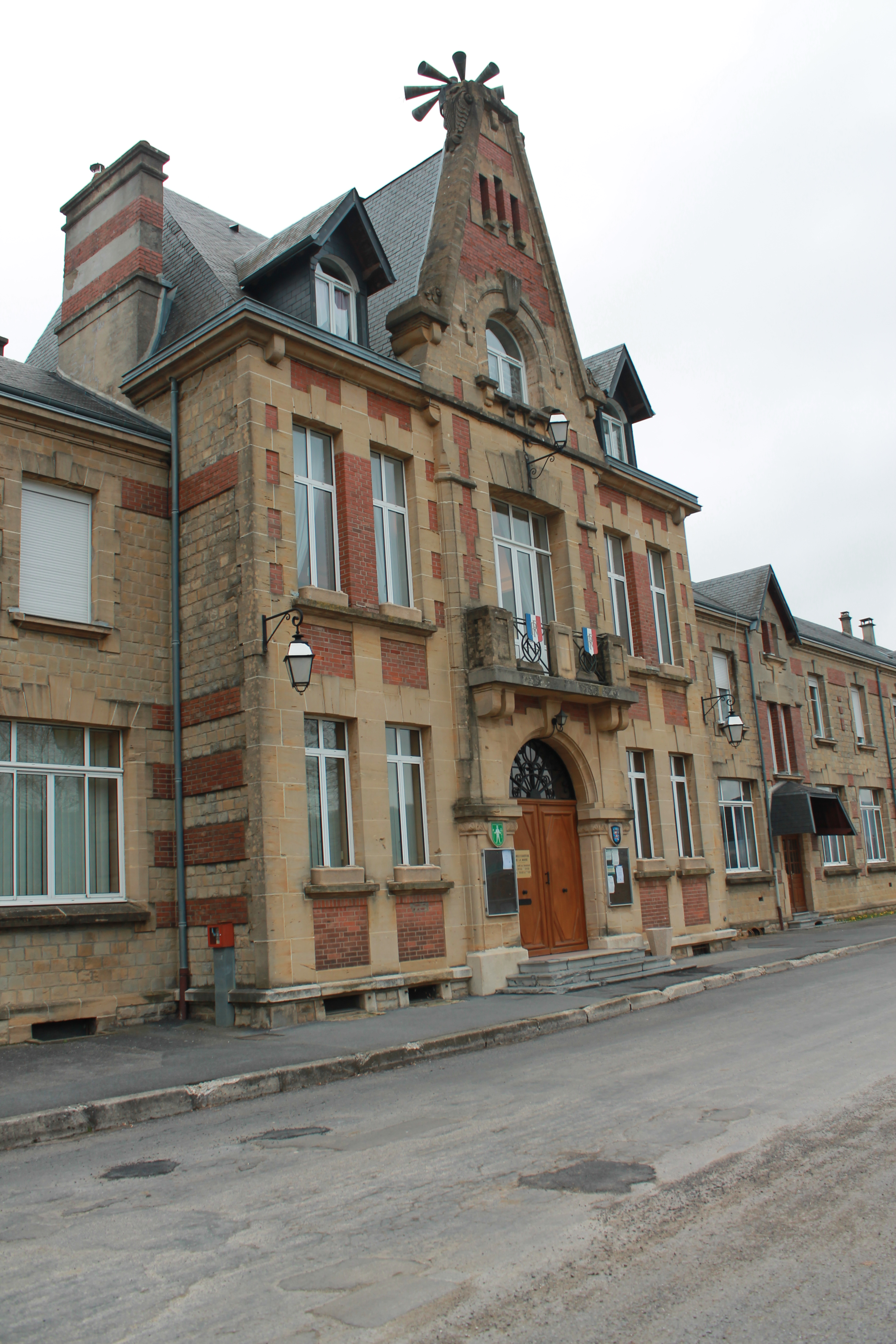 Mairie de Nouvion-sur-Meuse